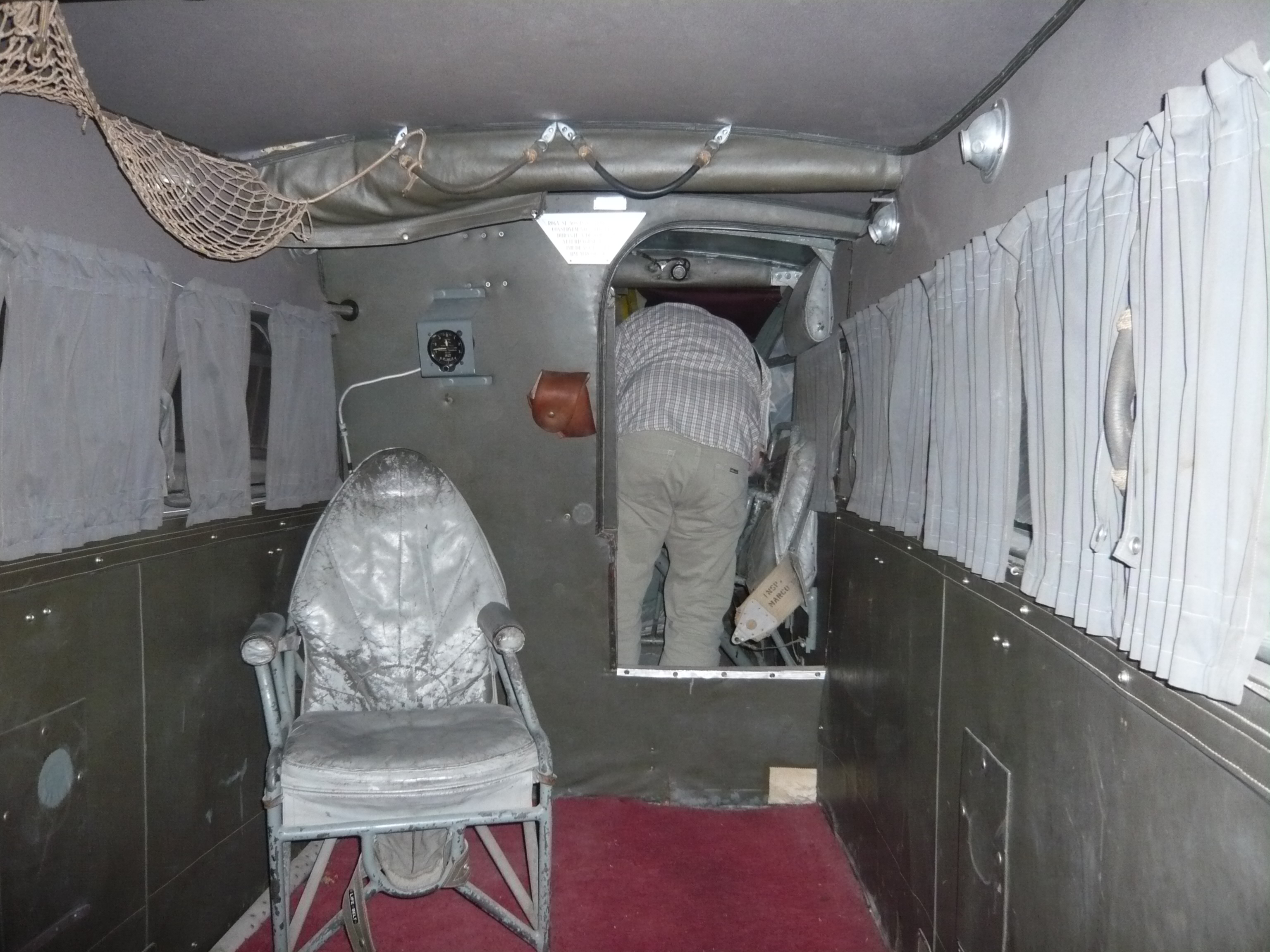 À procura da placa...